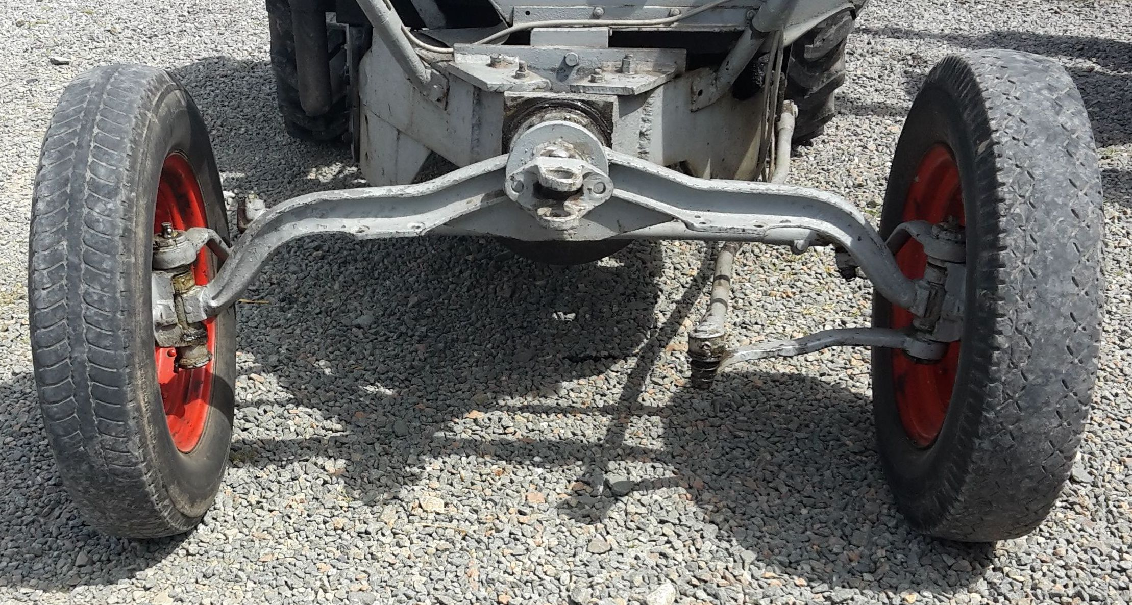 um Fahrzeuglängsachse drehbare vordere Starrachse eines Traktors ("Pendelachse")